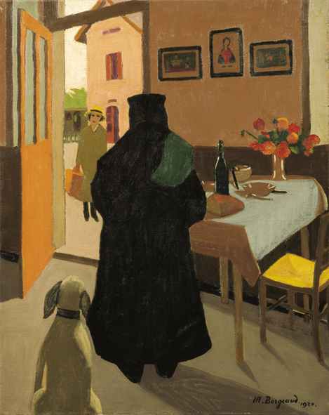 L'arrivée par le peintre suisse Marius Borgeaud, 1920, huile sur toile, collection privée, CR 221.